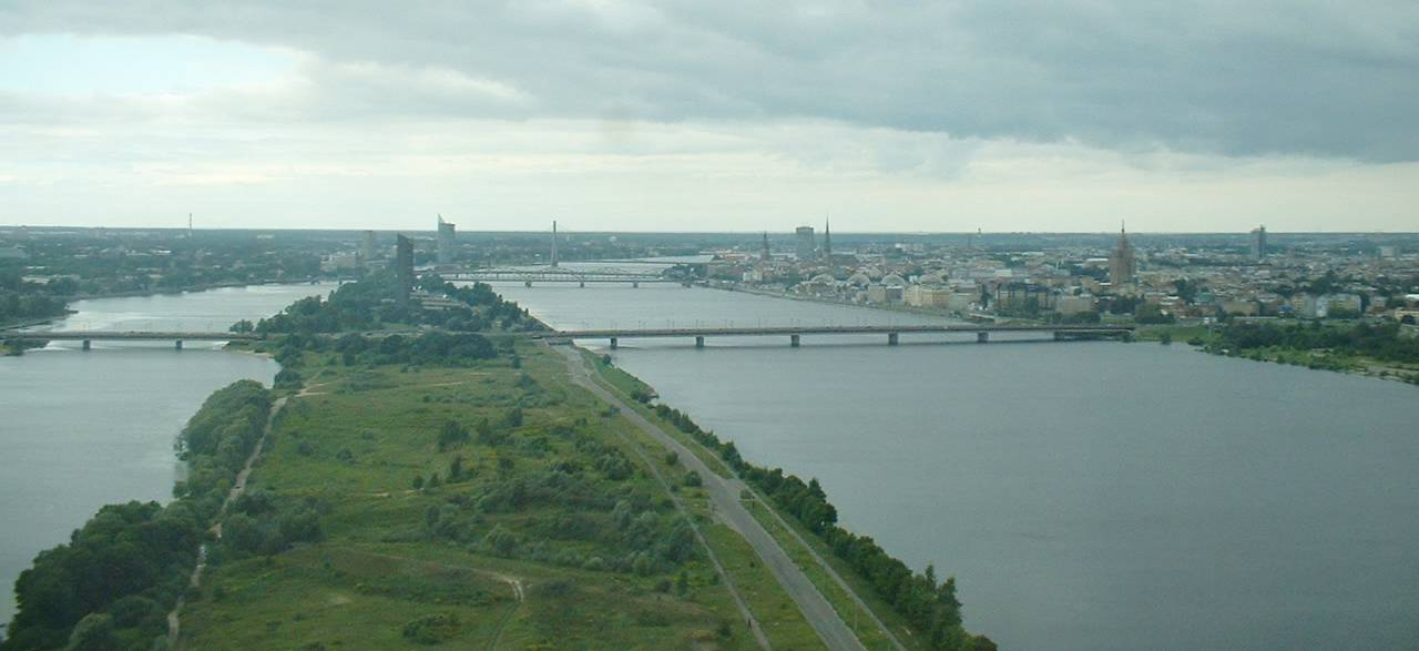 Blick vom Rigaer Fernsehturm auf die Düna